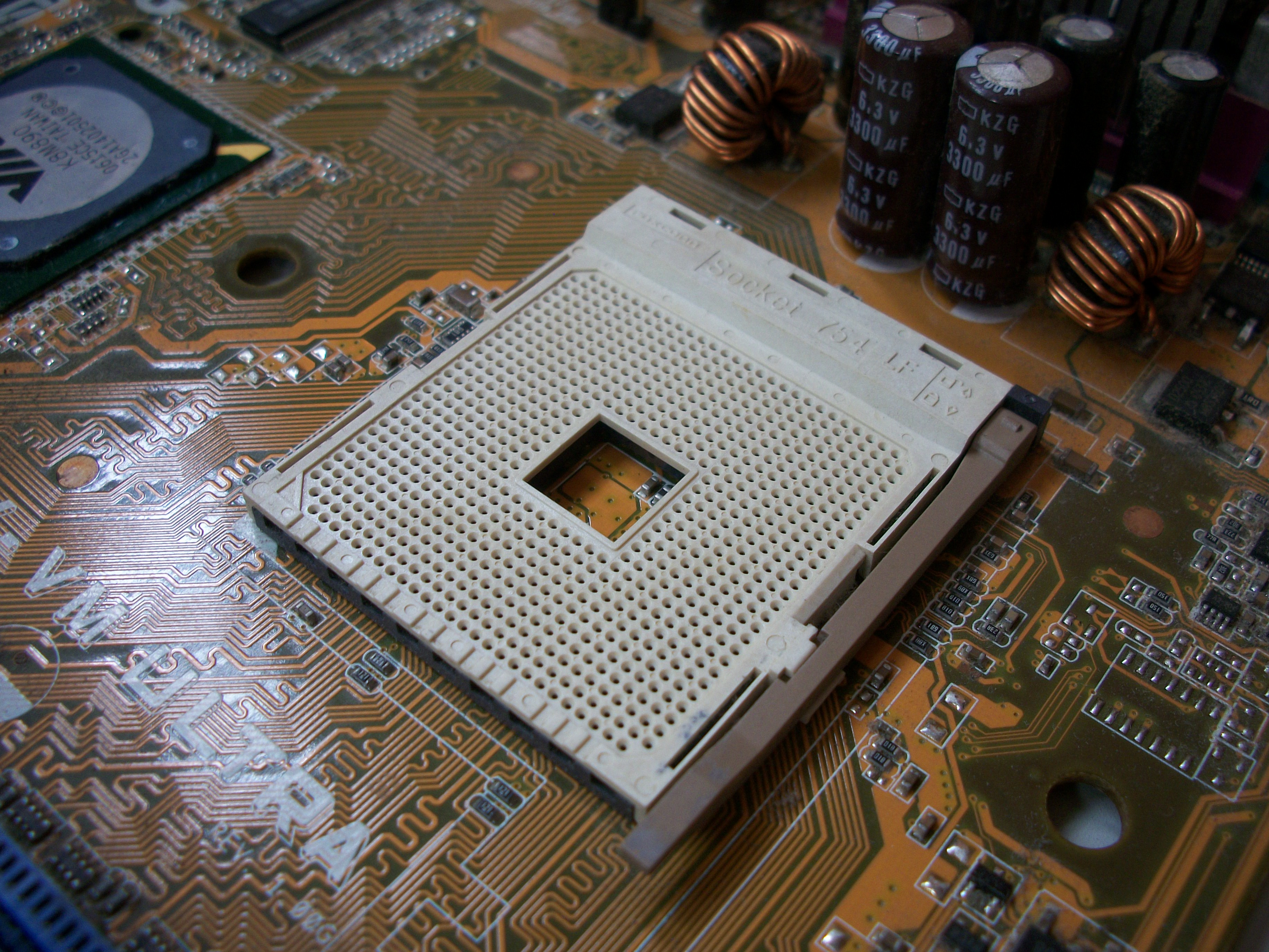 Foto de um soquete AMD 754. Foto de 2016!